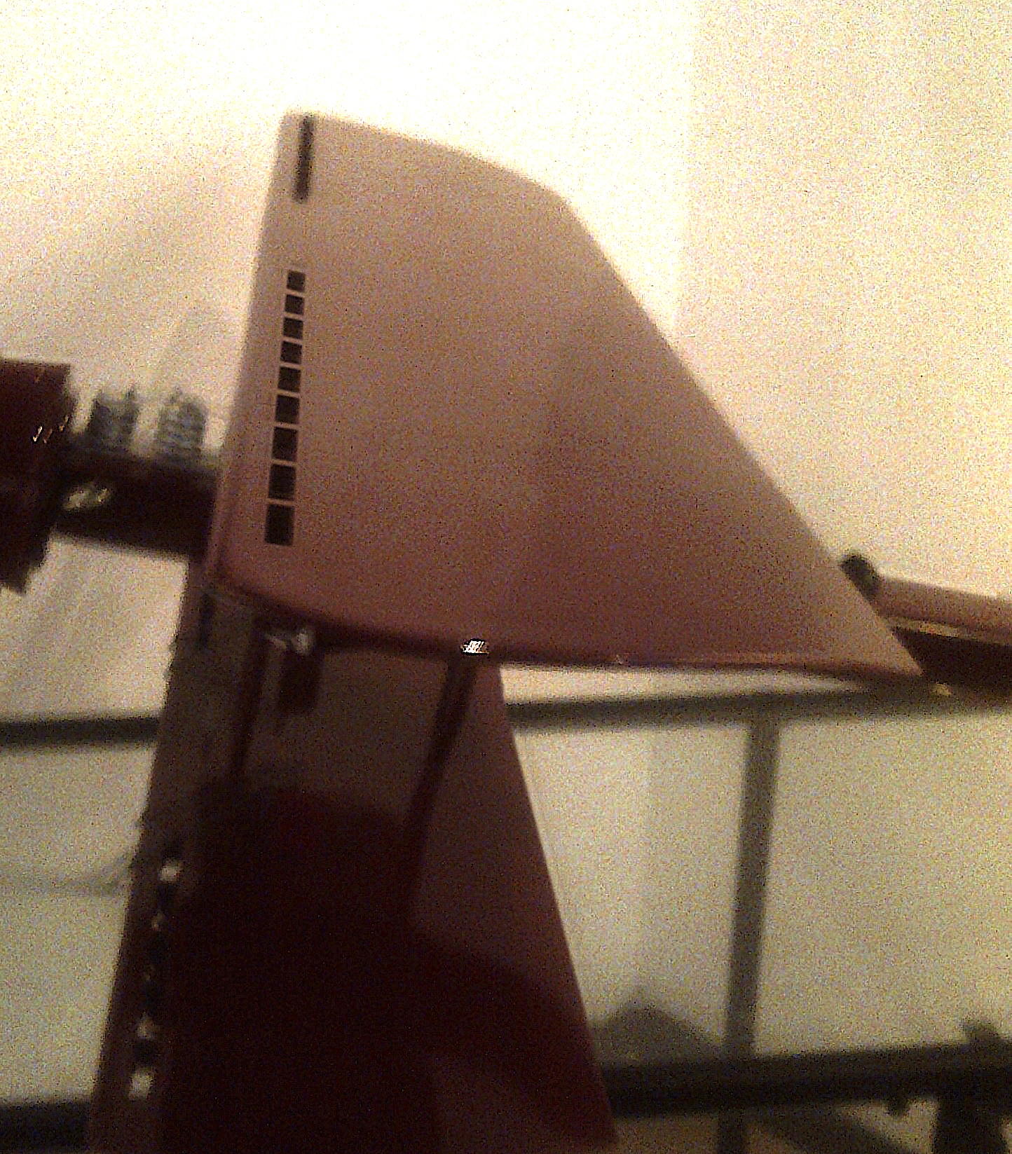 Bec à fente fixe de l'avion d'Henri Coandă (1910), photo de la maquette exposée à l'aéroport d'Otopeni-Bucarest